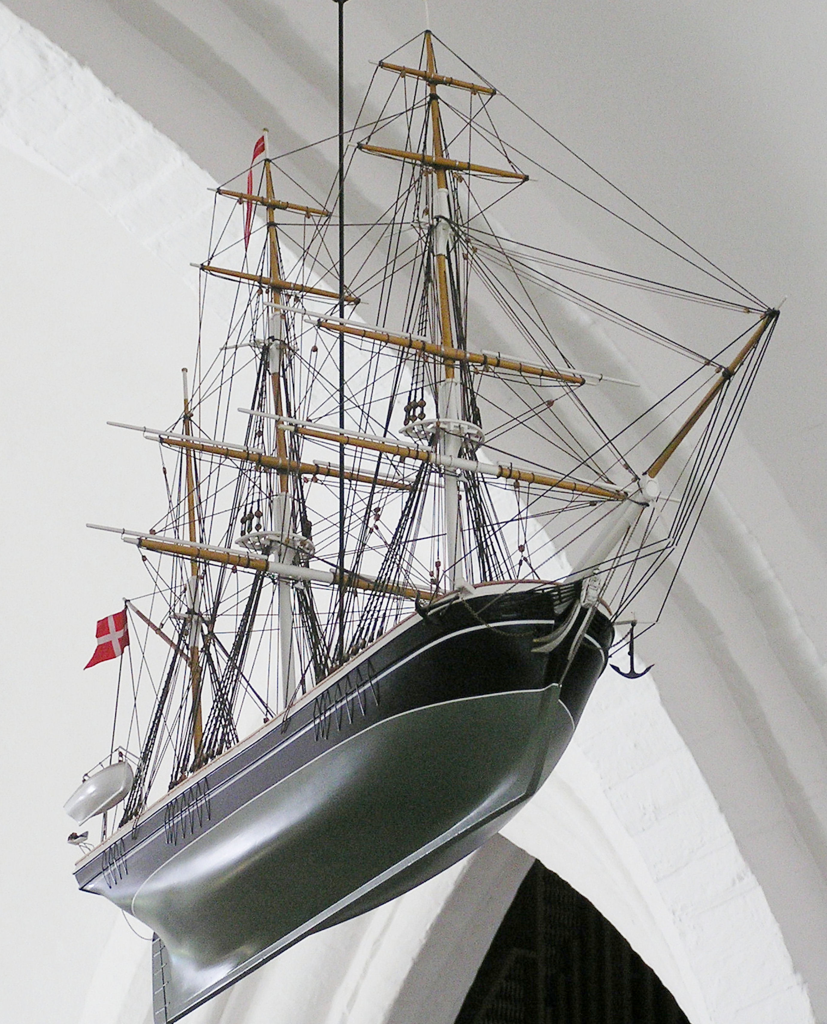 ’Nordlyset’, 3 master bark, bygget af maler Ove Andersen, Slagelse 1993 - 1994 ophængt 11. december 1994 i Sankt Mikkels Kirke, Rosengade 4, 4200 Slagelse Skænket af Ove Andersen, med sponsorbidrag fra Marineforeningens Slagelse afdeling, Slagelse Sparekasse og reklametegner Mogens Juul Jørgensen, Slagelse. I modellen er der nedlagt et brev og en 5 kr. Egetræsskib bygget i 1852 hos I. Løve & Søn, Helsingør til Den kgl Grønlandske Handel. Agterskibet hækbygget med fladt Spejl (platgattet). Lasteevne 300 T. Første rejse 13. maj 1853 – 15. november 1853 til Umanak og Upernavik, ført af Magnus Bang. I de 74 år skibet sejlede, udførte det 111 rejser. Solgt 1931 til ophugning i Sverige